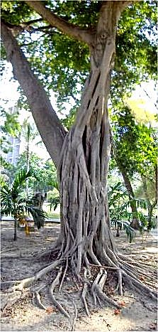 Higuerote or Matapalo, a parasitic tree (Coussapoa pittieri, Venezuela)